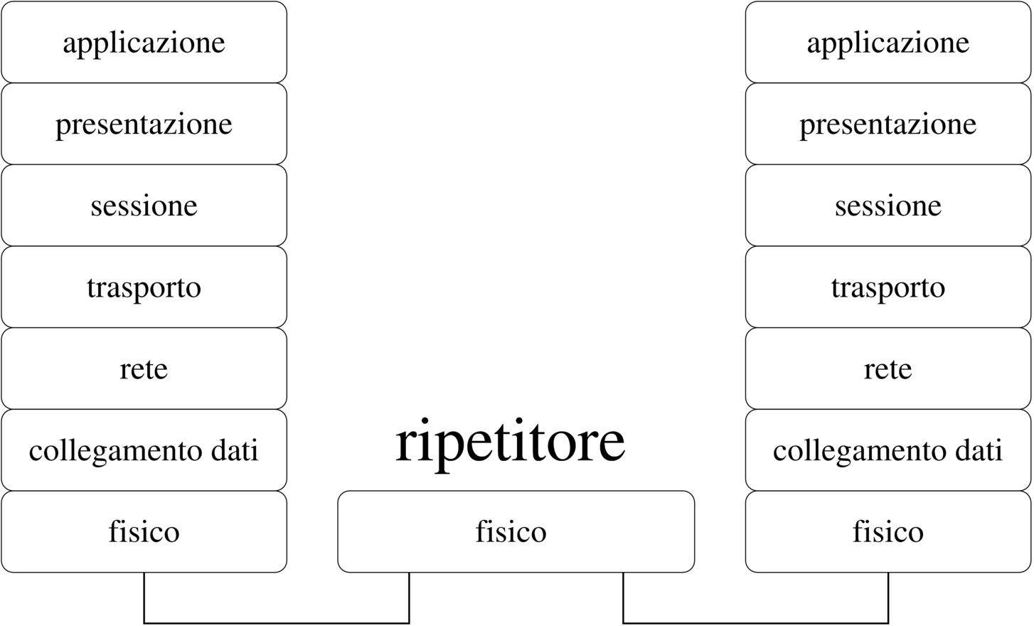 Figura 32.9. Il ripetitore permette di allungare una rete, intervenendo al primo livello del modello ISO-OSI.